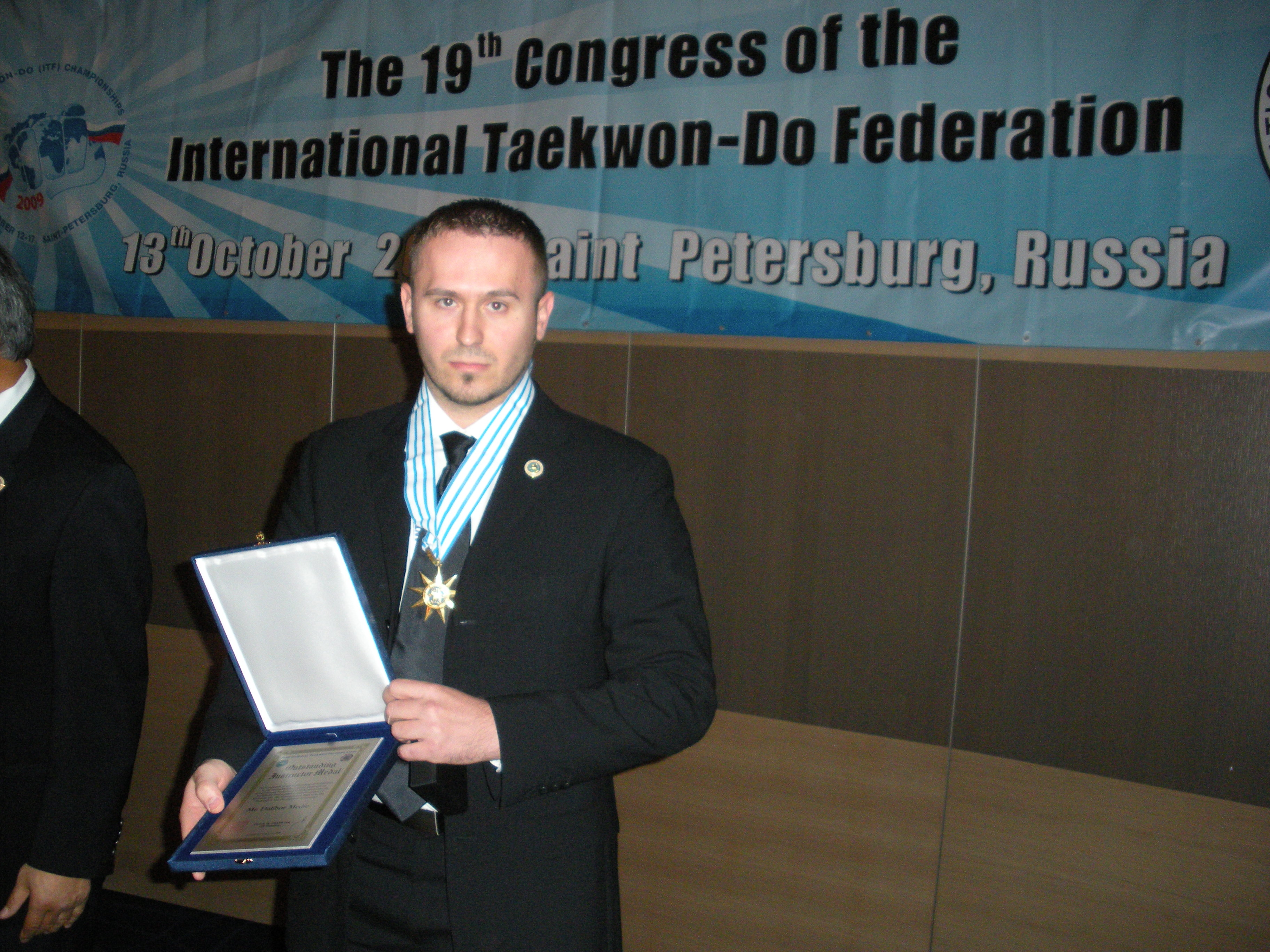 International Taekwon-Do Federation (ITF) Outstanding Medal 2009 - Dalibor Medic